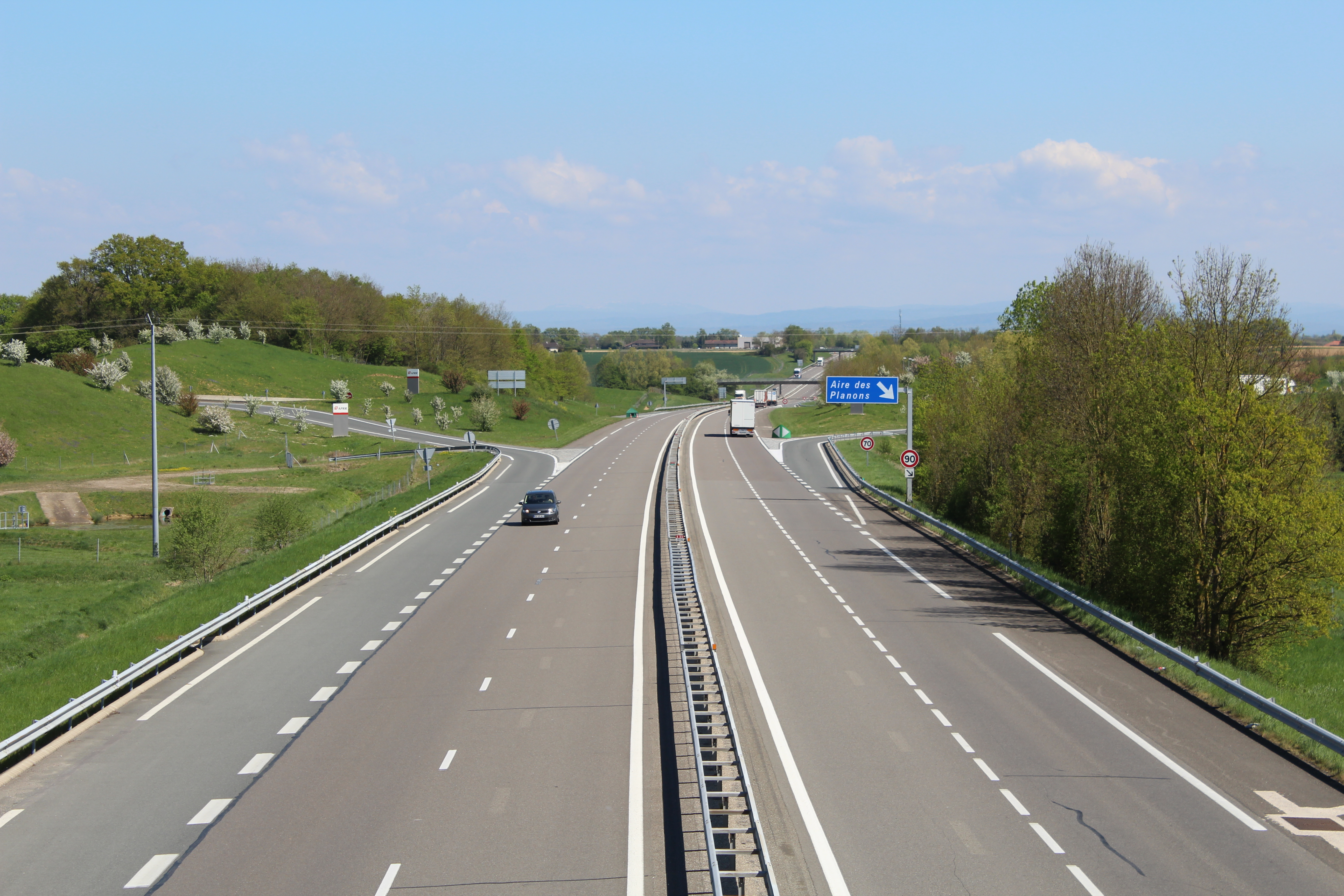 Vue sur l'A40 avec à gauche l'aire du musée départemental de la Bresse et à droite l'aire des Planons.